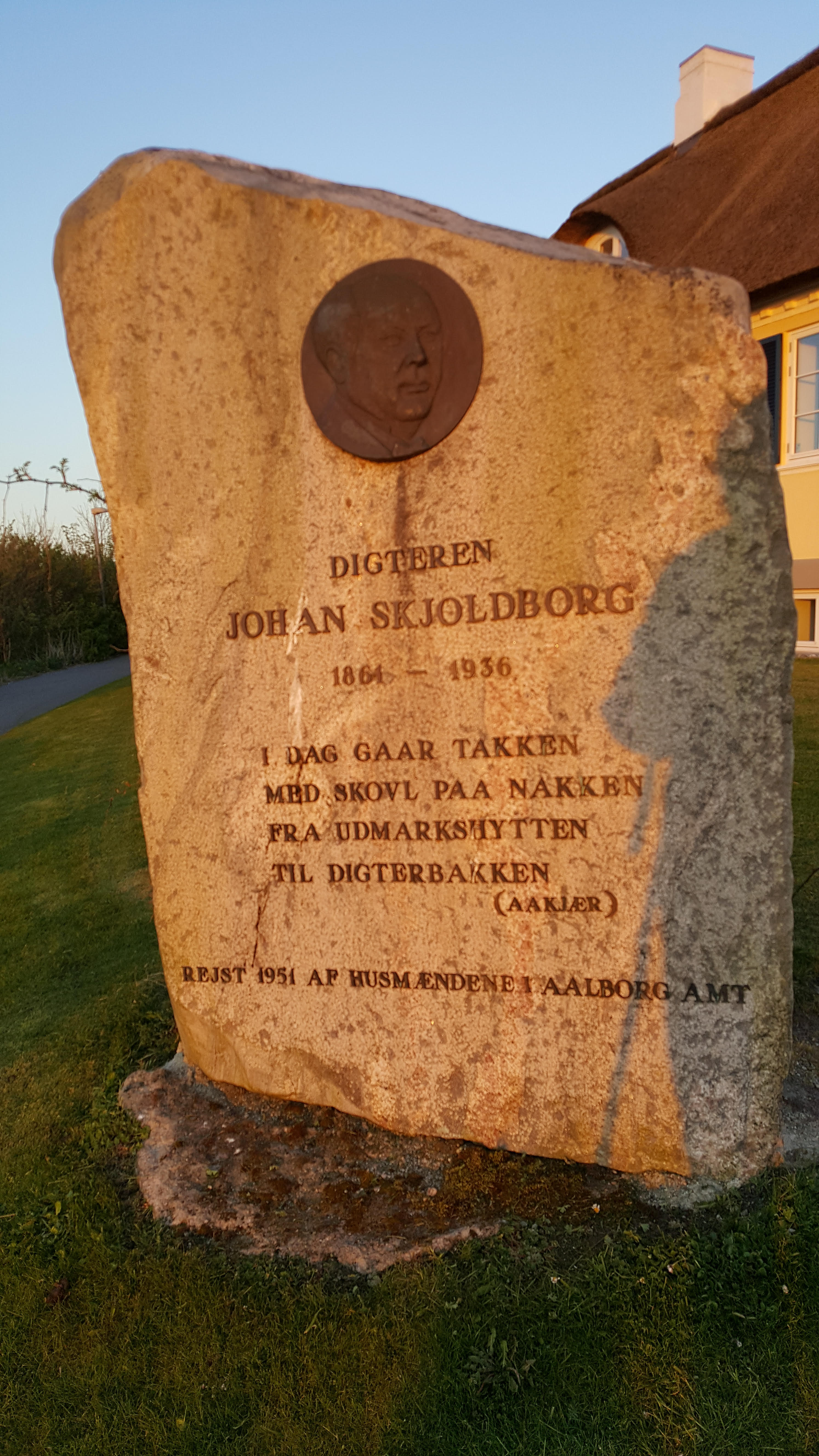 Jyske husmænd rejste en mindesten for Johan Skjoldborg foran det hus i Løgstør, de havde skænket ham. Digtet på stenen er af Jeppe Aakjær.